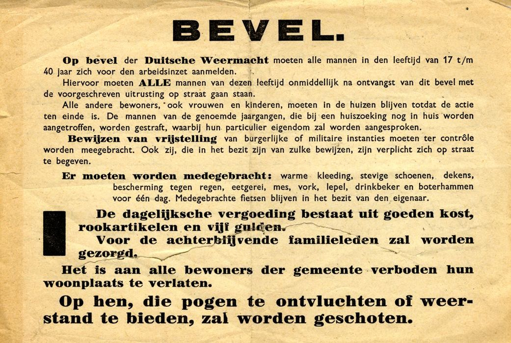 Inventarisnummer 6968-A Eigen nummer doos 18 Afmeting hg 14,8 / br 20,7 Annotatie Op bevel der Duitsche Weermacht moeten alle mannen in den leeftijd van 17 t/m 40 jaar zich voor den arbeidsinzet melden. ..............